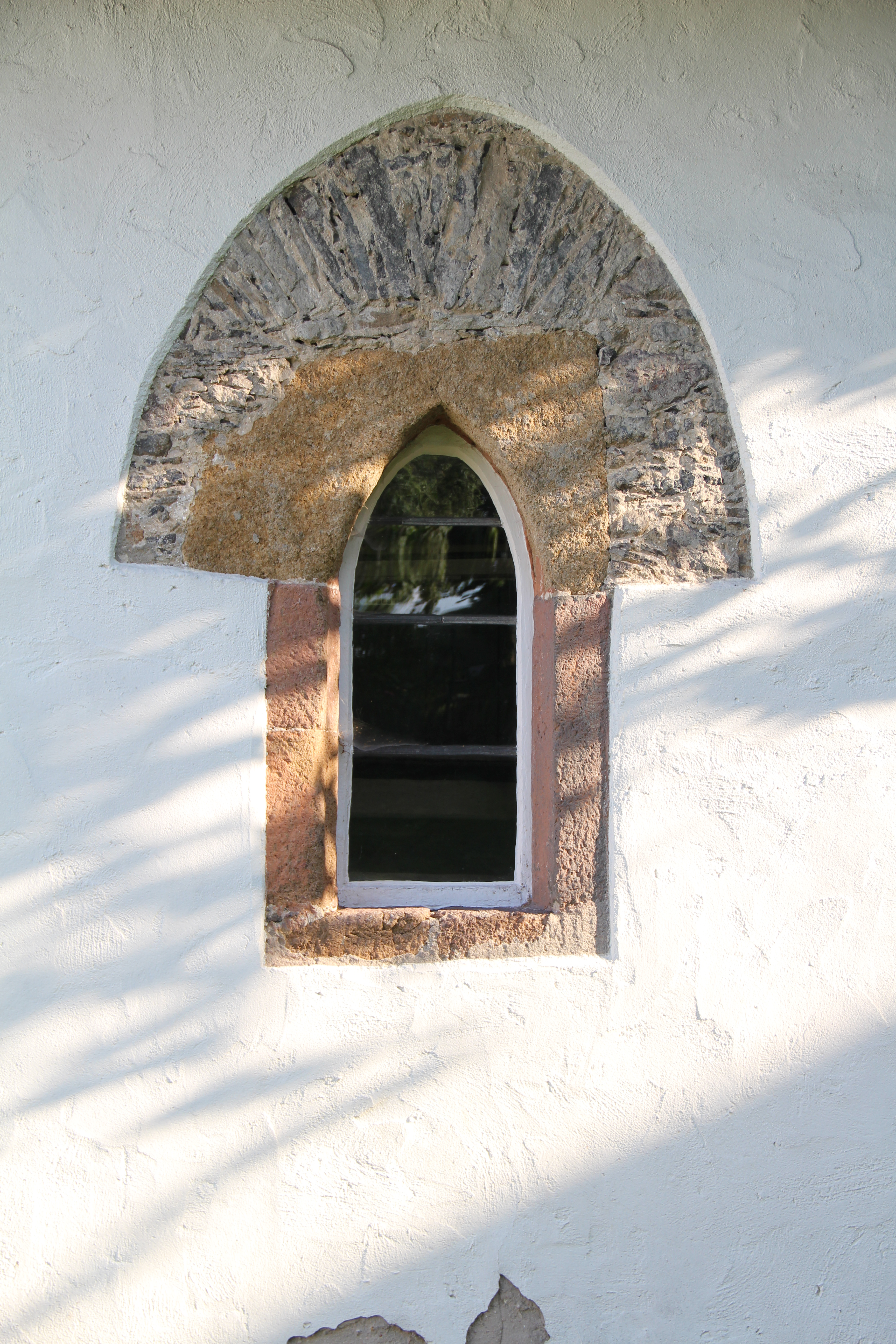 Beltershain